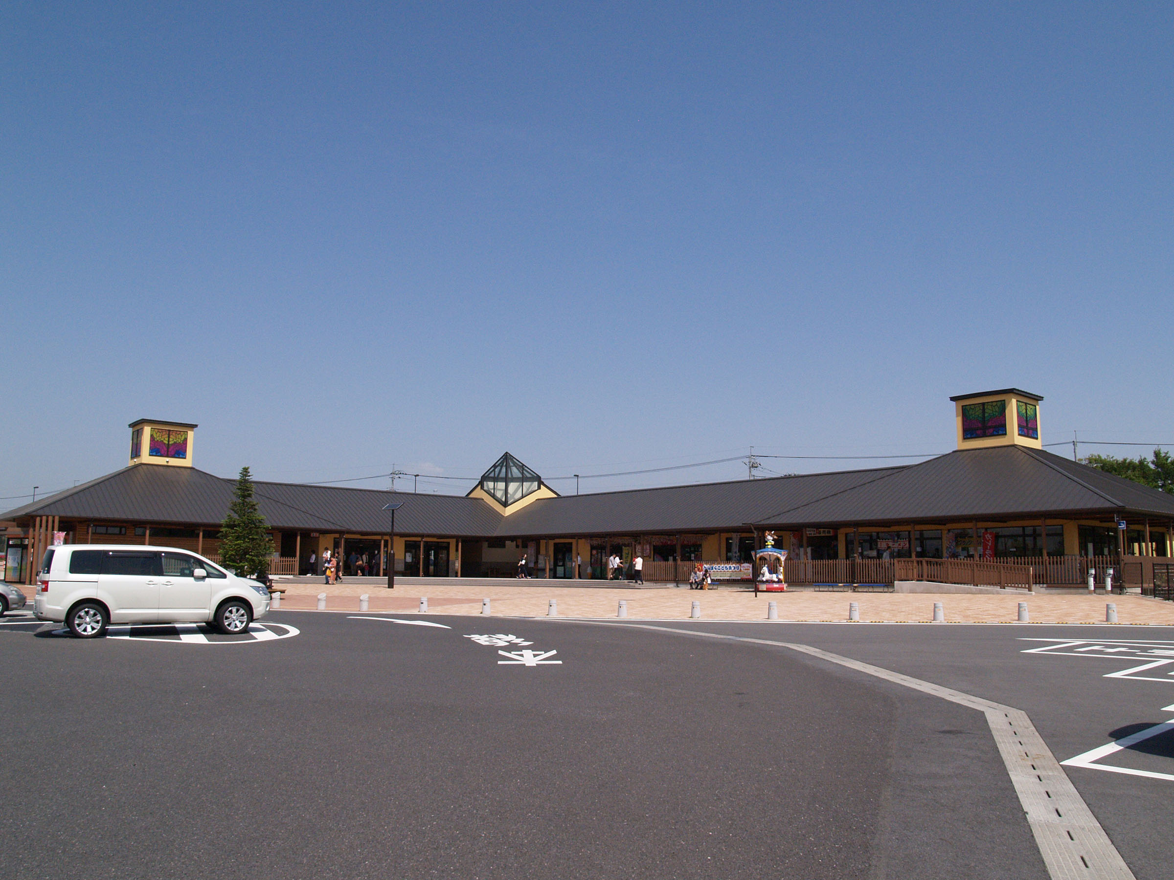 壬生パーキングエリアに設置されているハイウェイオアシス